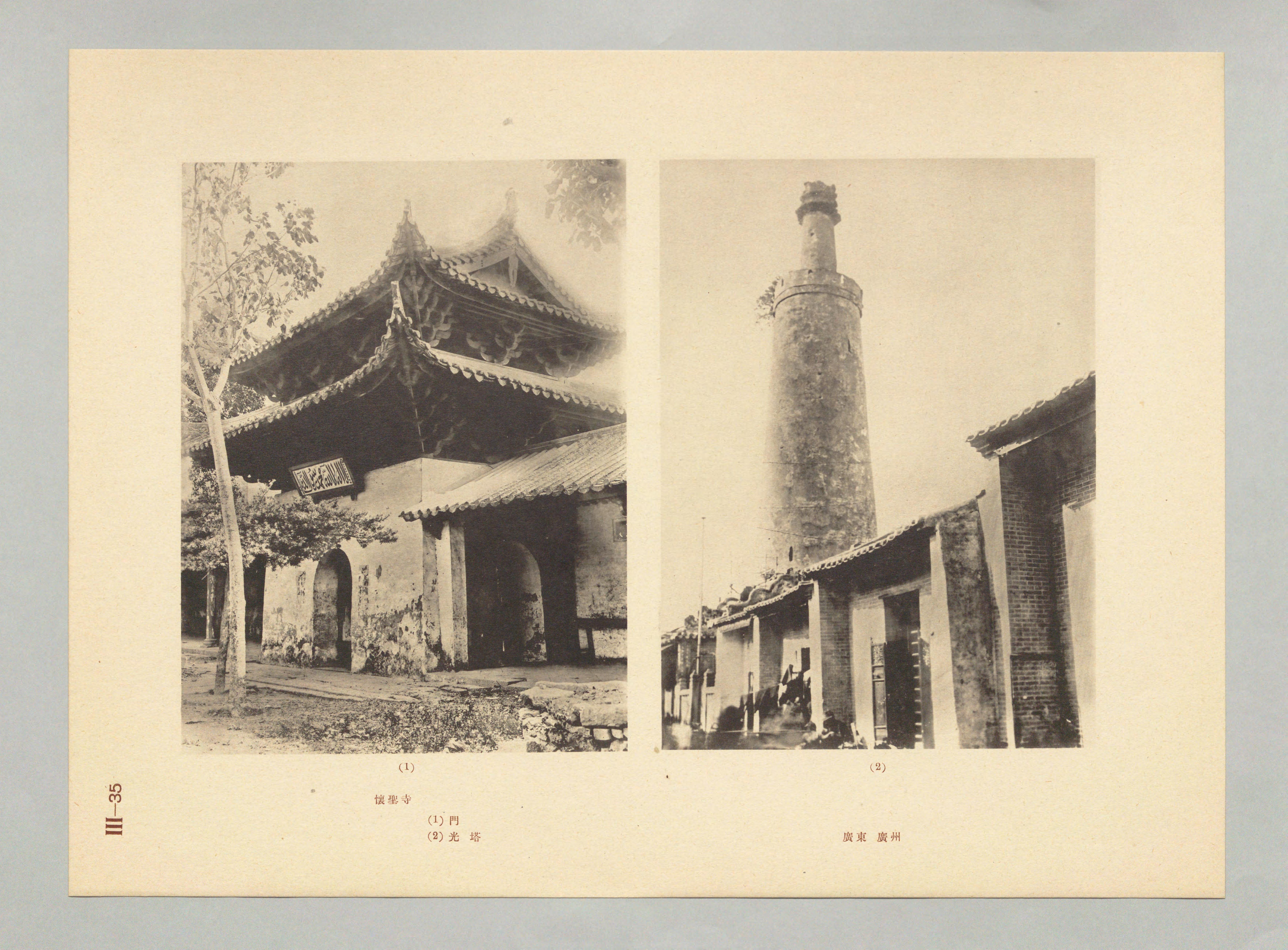 廣州市懷聖寺大門及光塔